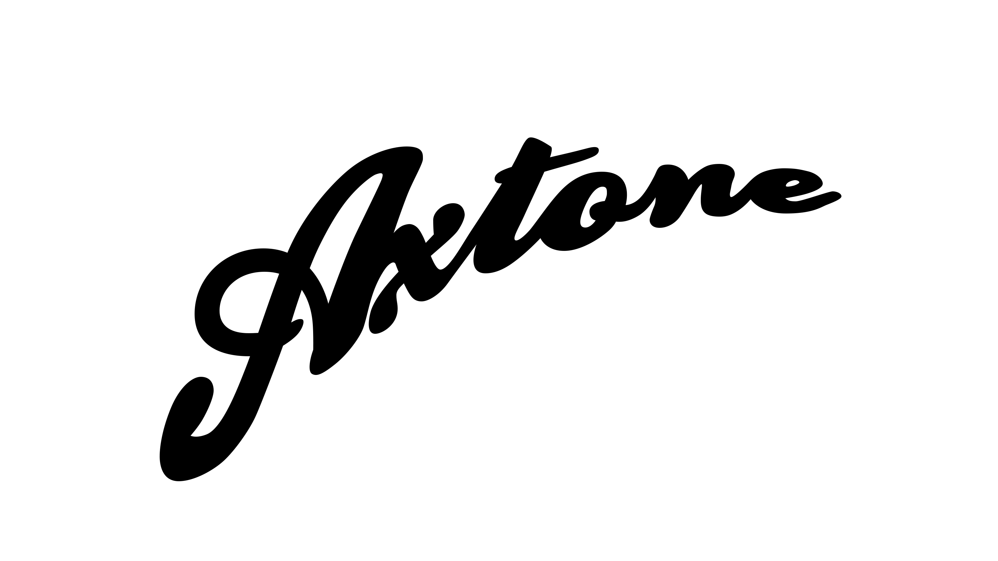 Logo avec transparence du label de musique électronique Axtone Records.